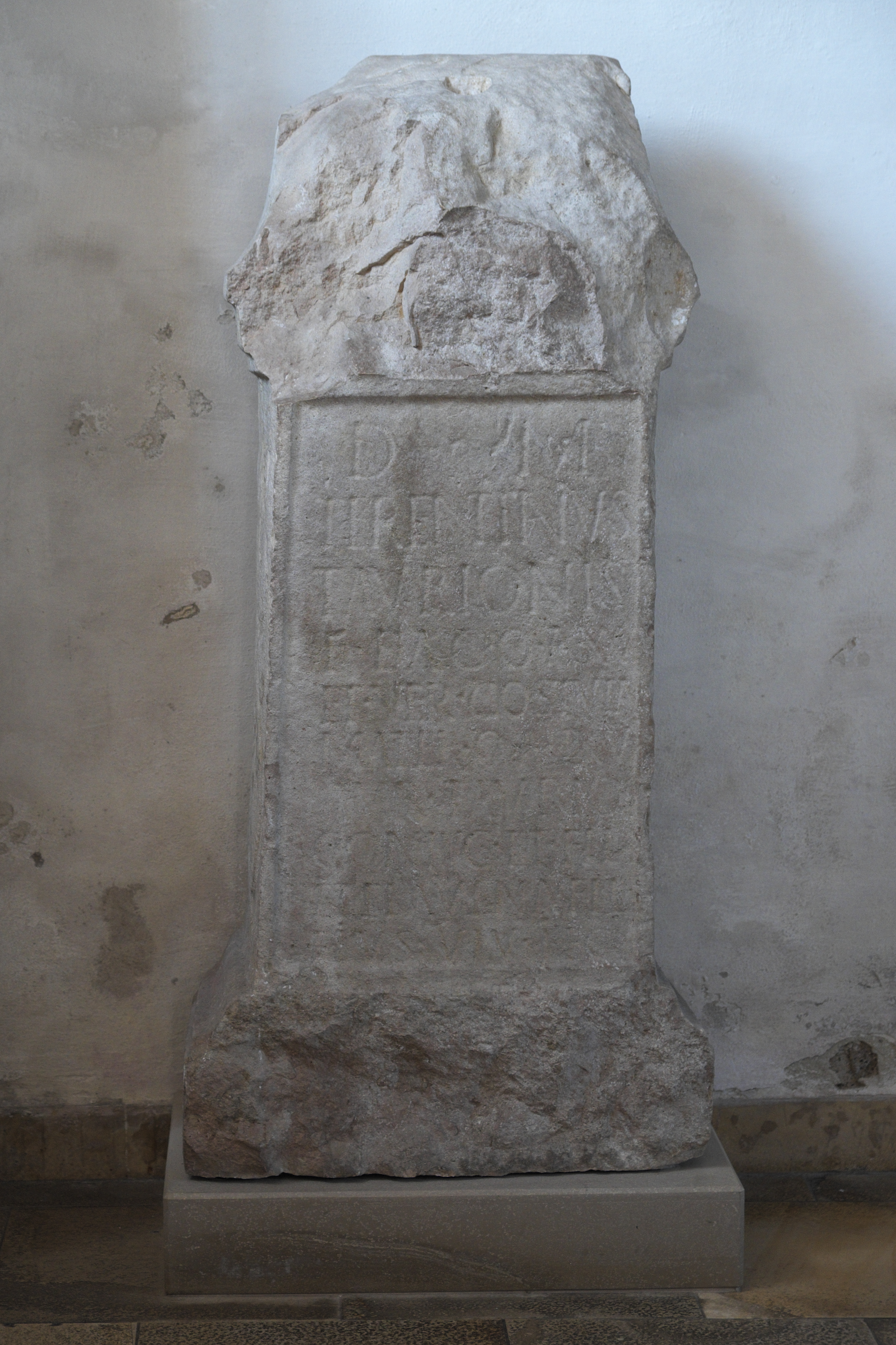 Römischer Grabaltar in der katholischen Pfarrkirche St. Rupertus in Eiselfing im Landkreis Rosenheim (Bayern/Deutschland)